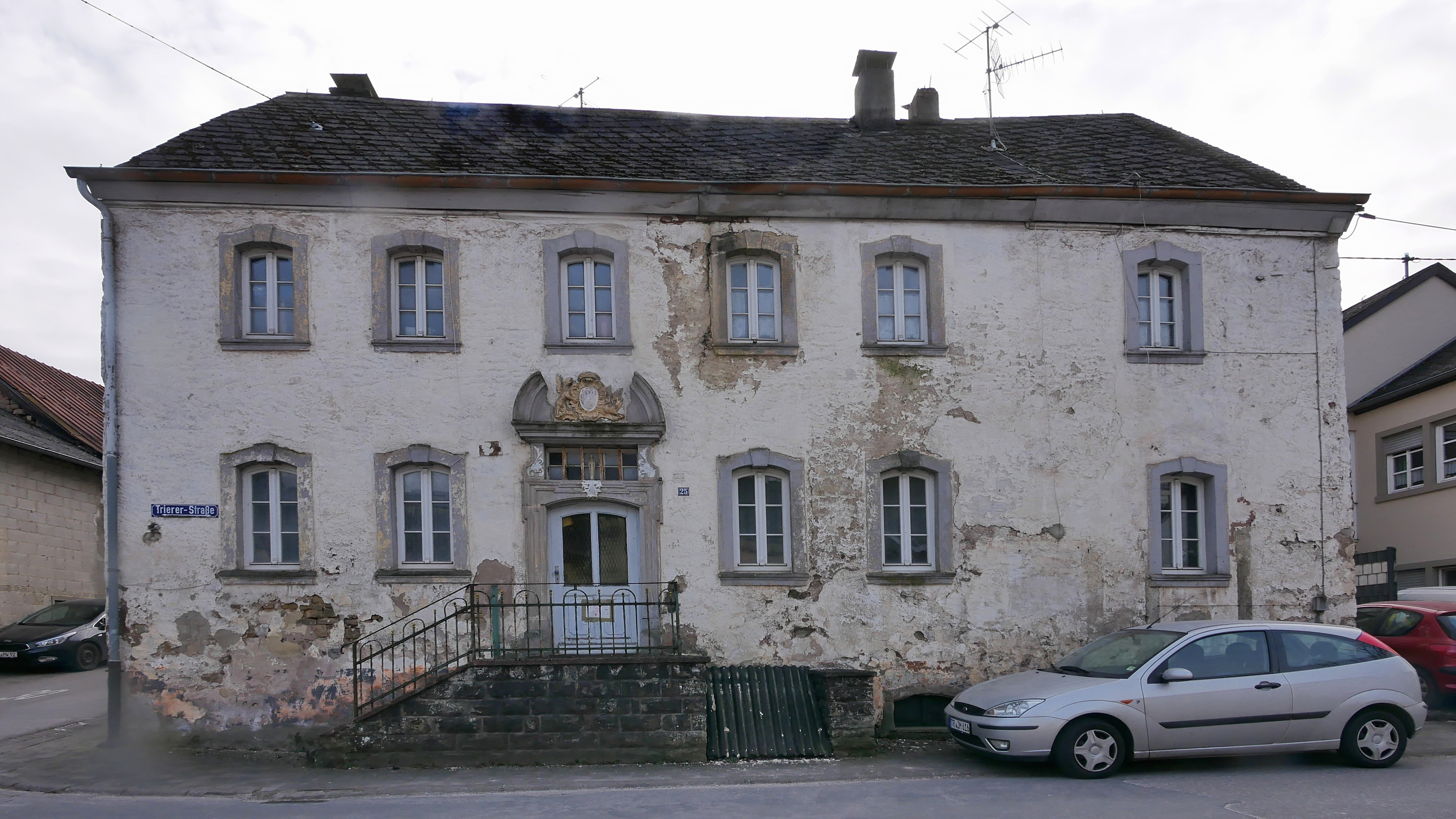 Aach bei Trier, Hofhaus St. Irminen. Gutshof des Klosters St. Irminen aus Trier. Erbaut 1725.